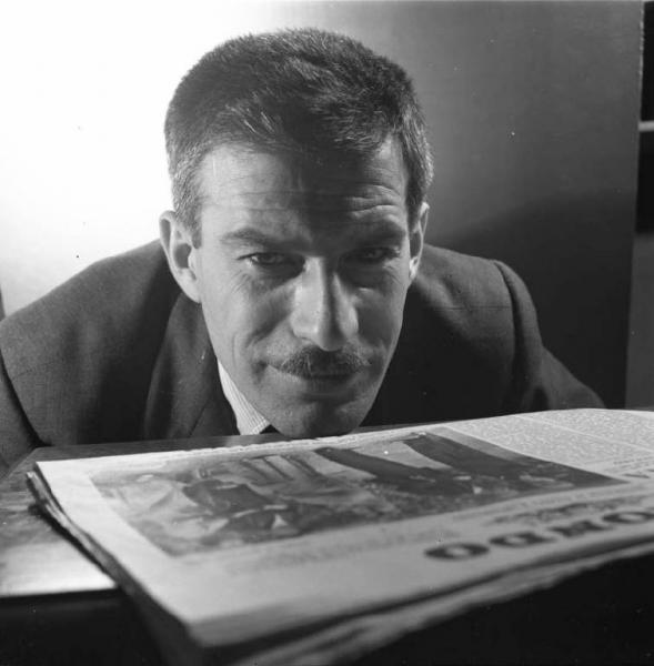 Immagine di Elio Vittorini a Milano